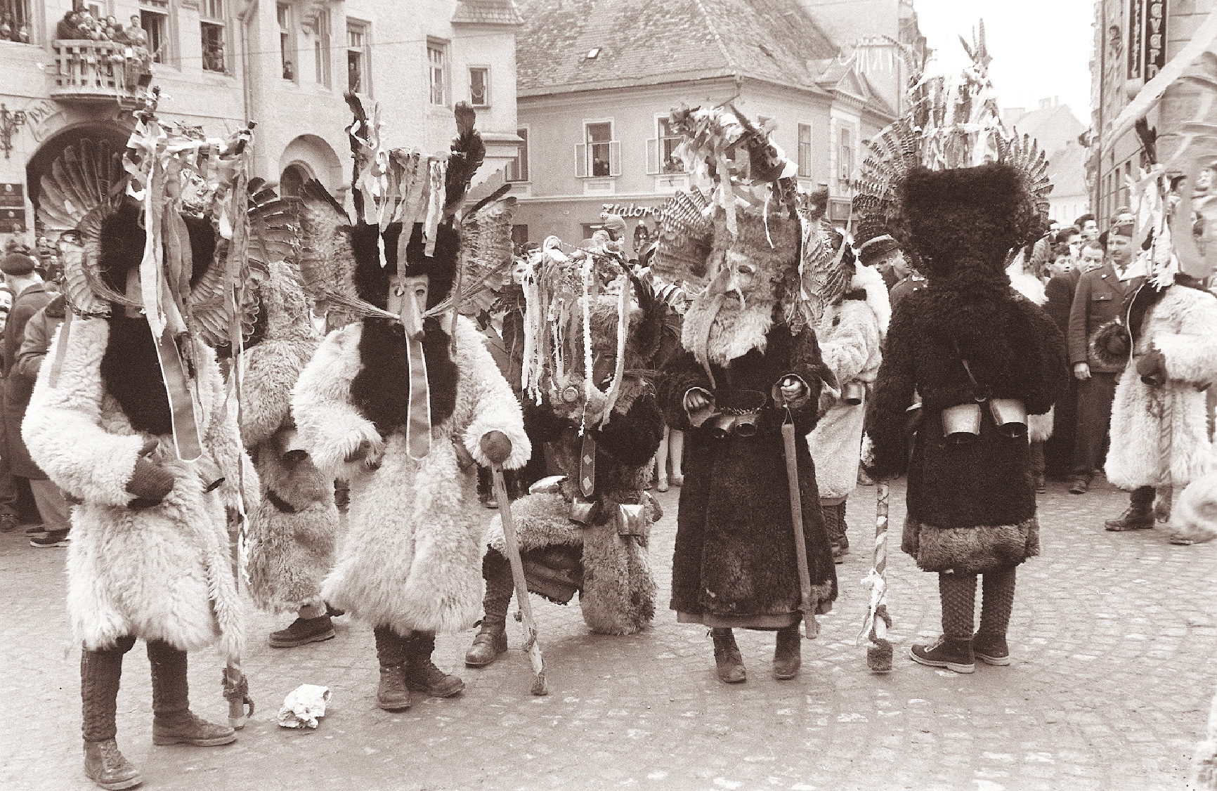 Ptujski pustni karneval in kurentovanje